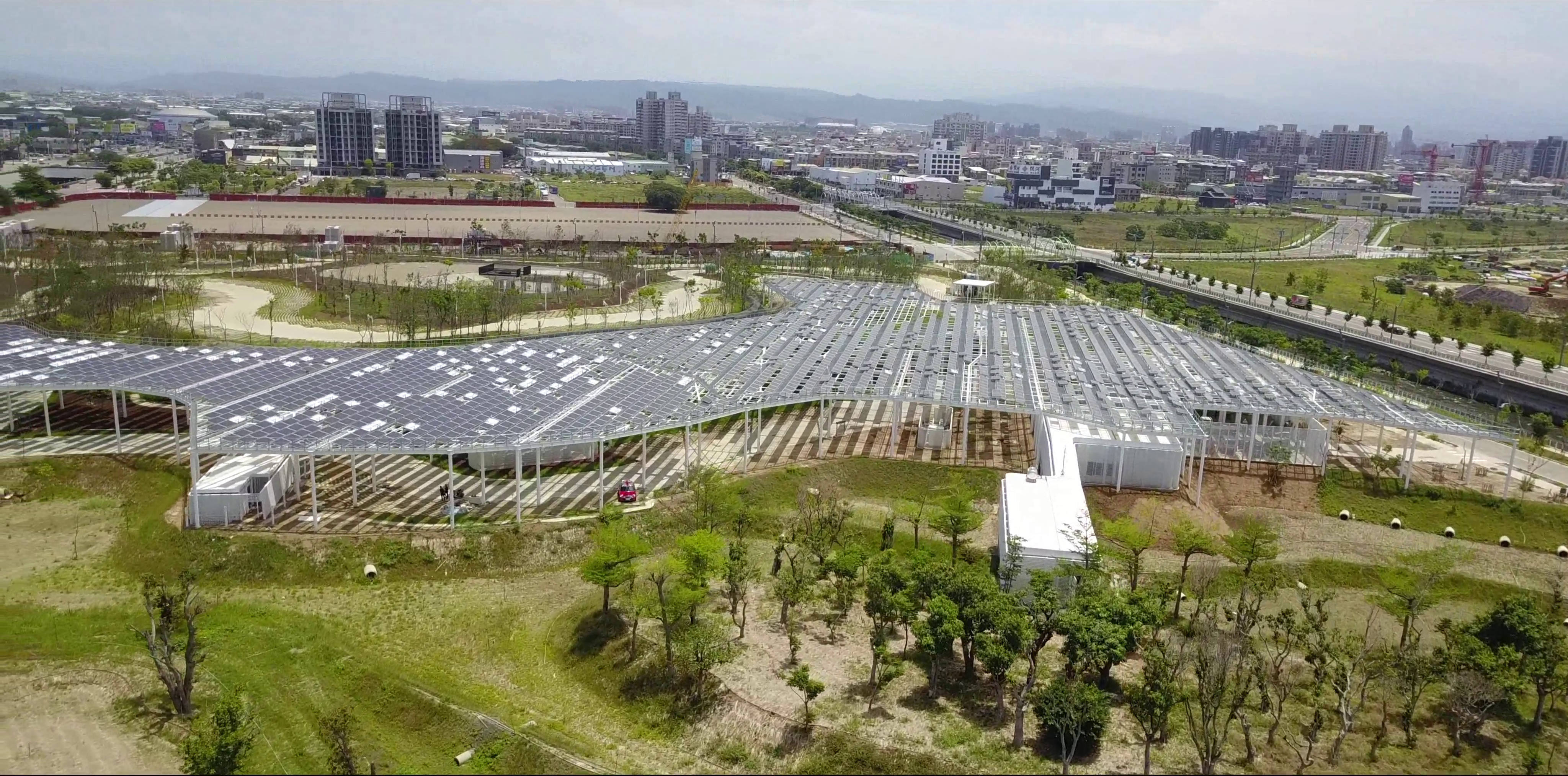 Vue de la partie Nord du Parc Central de Taichung, Taiwan, avec sa conopée de 7000 m2 de panneaux photovoltaïques